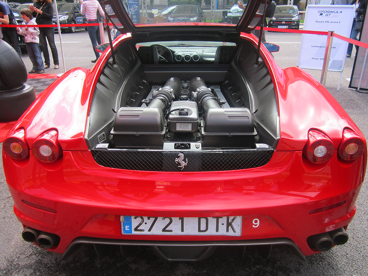 Salón del Automóvil, Barcelona 2013